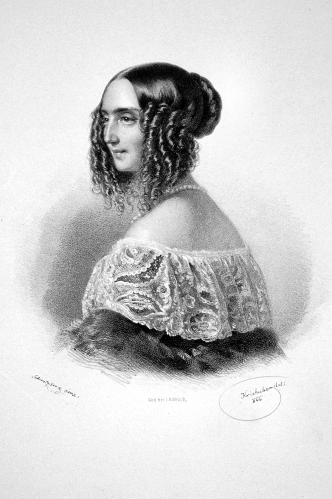 Henriette Wertheimer, gb. Ullmann (geb. 1804), Ehefrau des jüdischen Philanthropen Josef von Wertheimer.